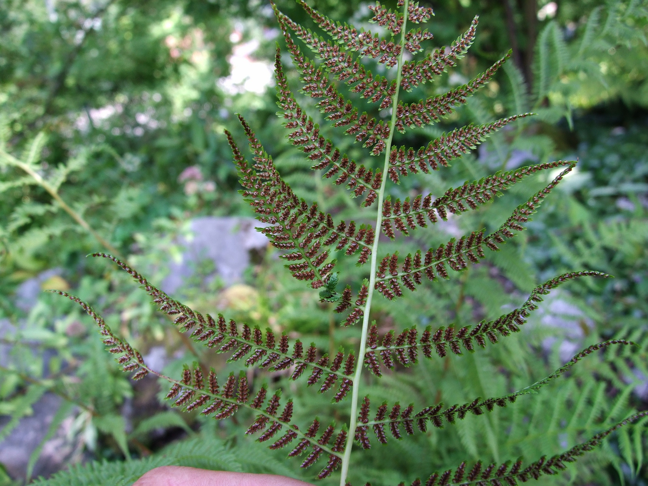 Athyrium distentifolium